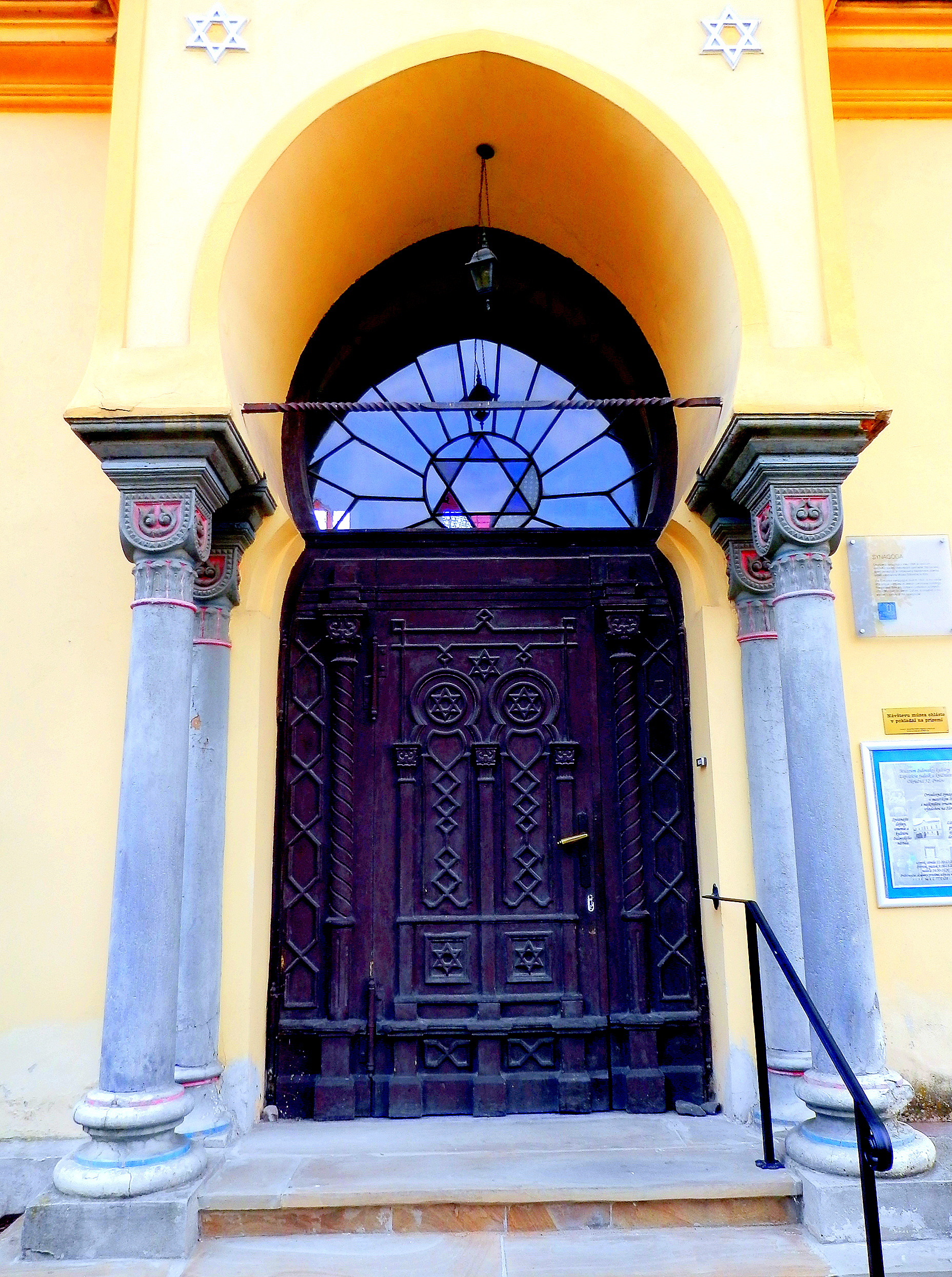 Detail vchodových stĺpov zo severnej strany. Ortodoxná synagóga bola postavená v roku 1898. Stavba sa dodnes využíva ako modlitebňa. Na ženskej galérii je inštalovaná tzv. Barkányova zbierka judaík – expozícia Múzea židovskej kultúry.